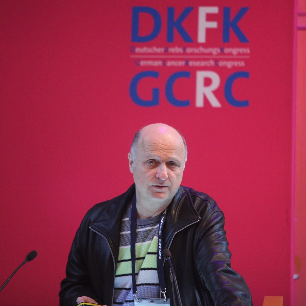 Uwe Haberkorn, bei einem Vortrag beim 1. Deutschen Krebsforschungskongress am 4. Februar 2019 in Heidelberg